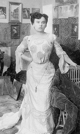 Cecilia Cuțescu-Storck (n. 14 martie 1879, Câineni, Vâlcea - d. 1969, București). Portret realizat de catre soţul ei Frederic Storck